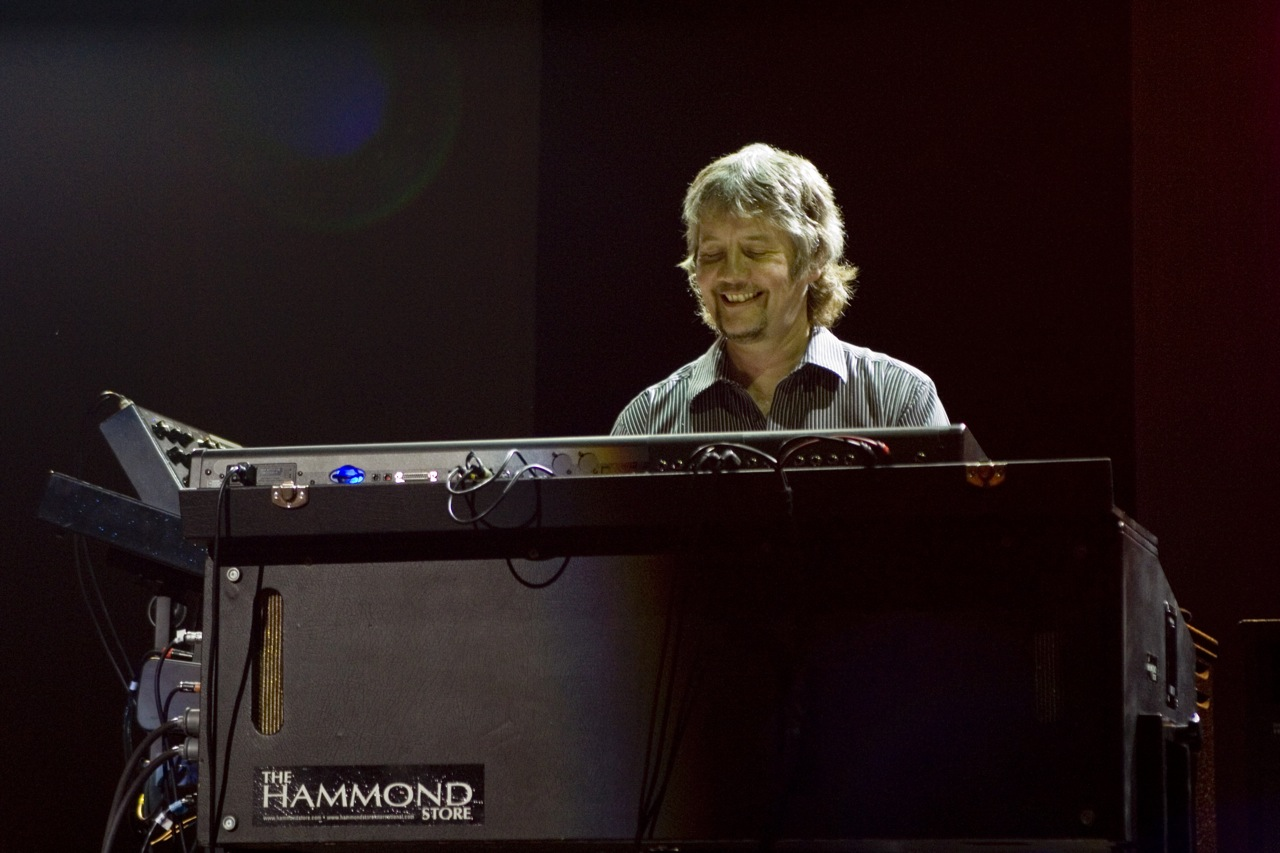 Deep Purple Live @ Via Funchal - 07/03/2009 - São Paulo, Brasil É proibida a cópia ou reprodução deste material sem a autorização do autor. Por favor, não publique nada daqui sem o devido crédito. Fotógrafo: Alexandre Cardoso